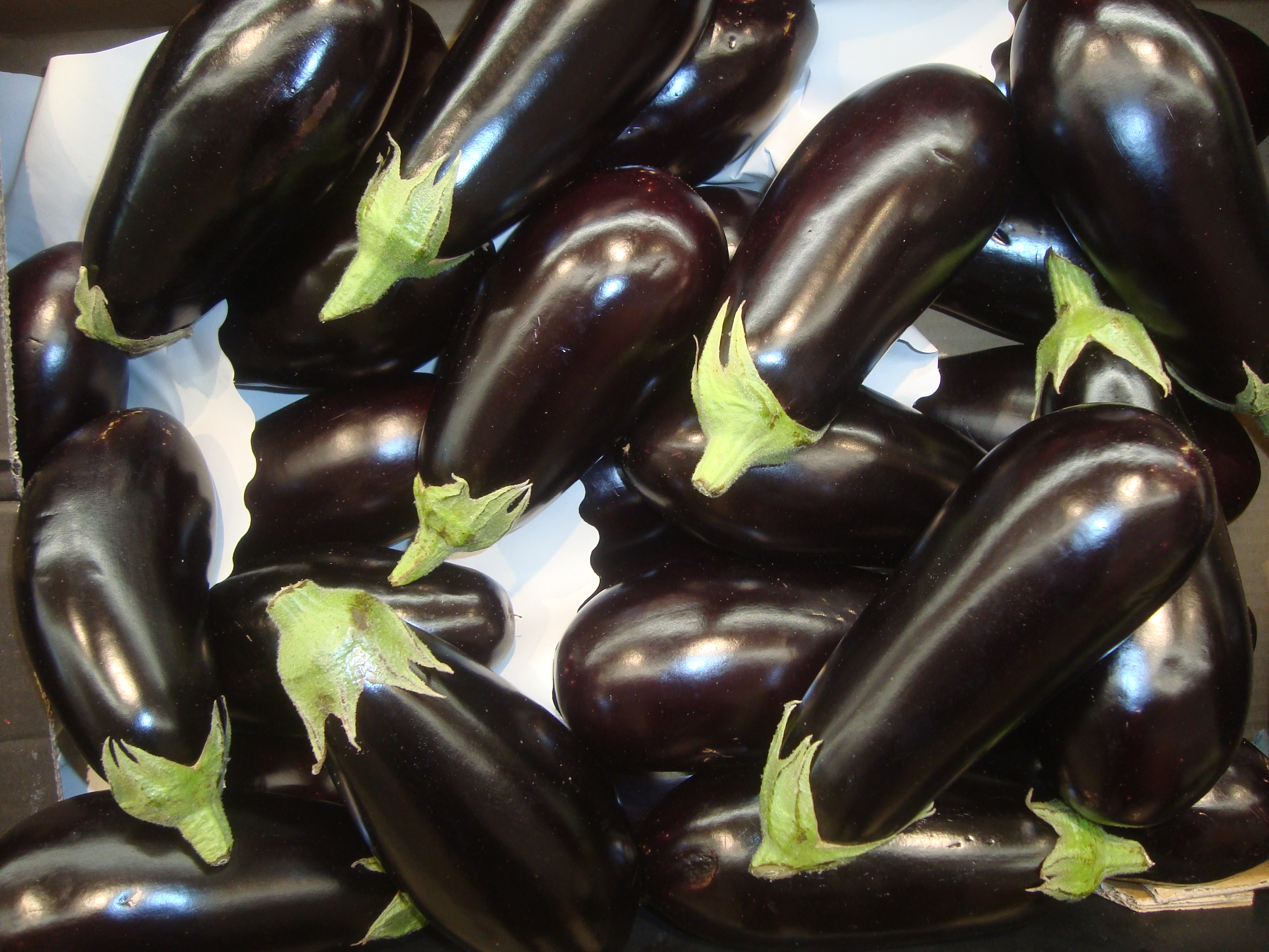 Berenjenas negras (Castellón, España).